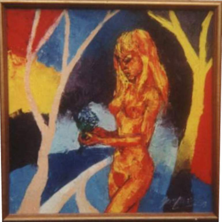 Konvalinky — Jiří Meitner. olej špachtlí, plátno - oil, palette knife, canvas; 1990.